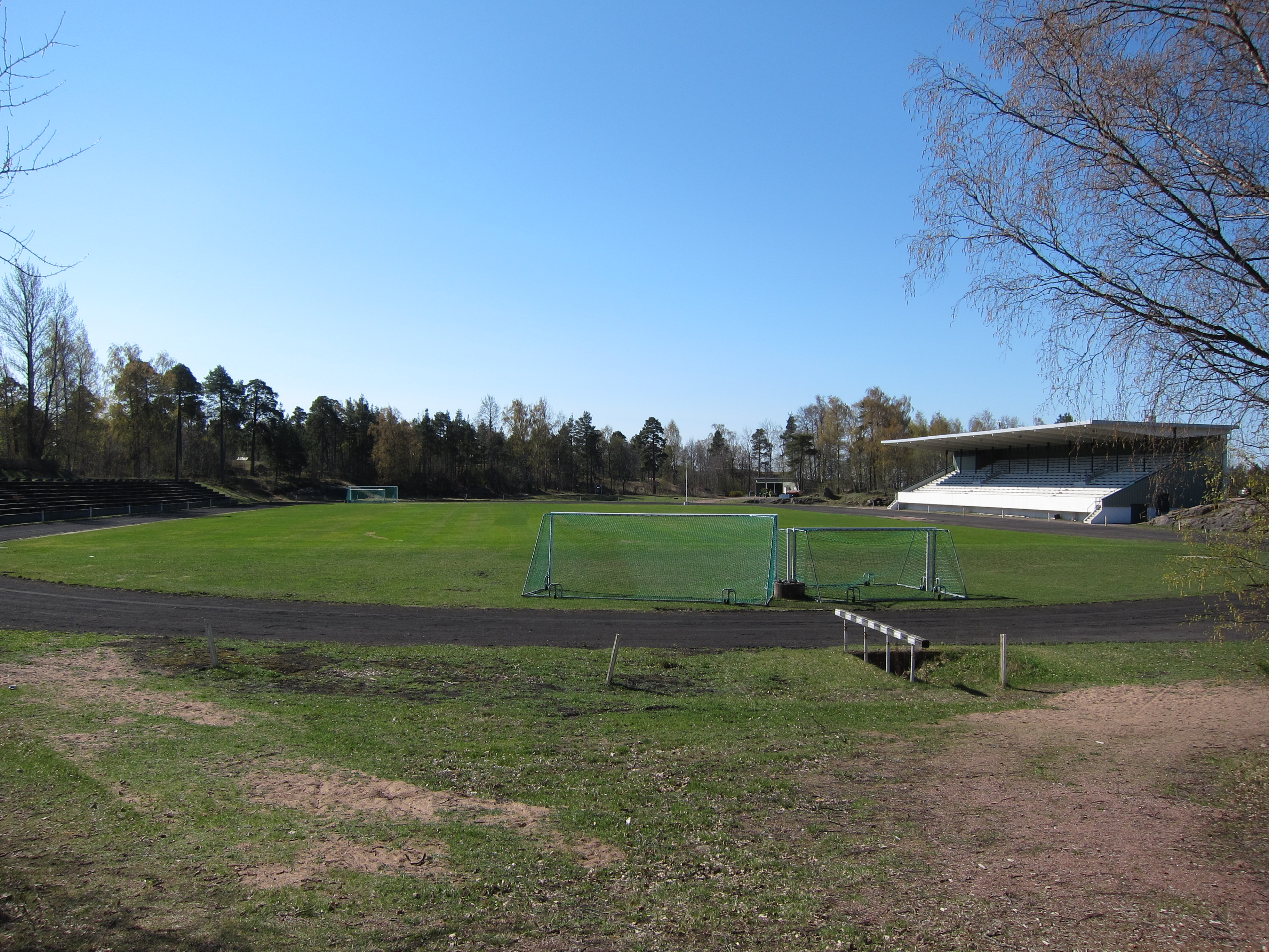 Puistolan urheilukenttä Kotkassa Katariinan kaupunginosassa.